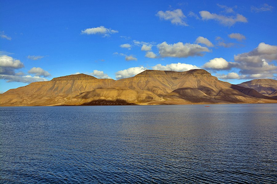 Der Adventfjord auf Spitzbergen